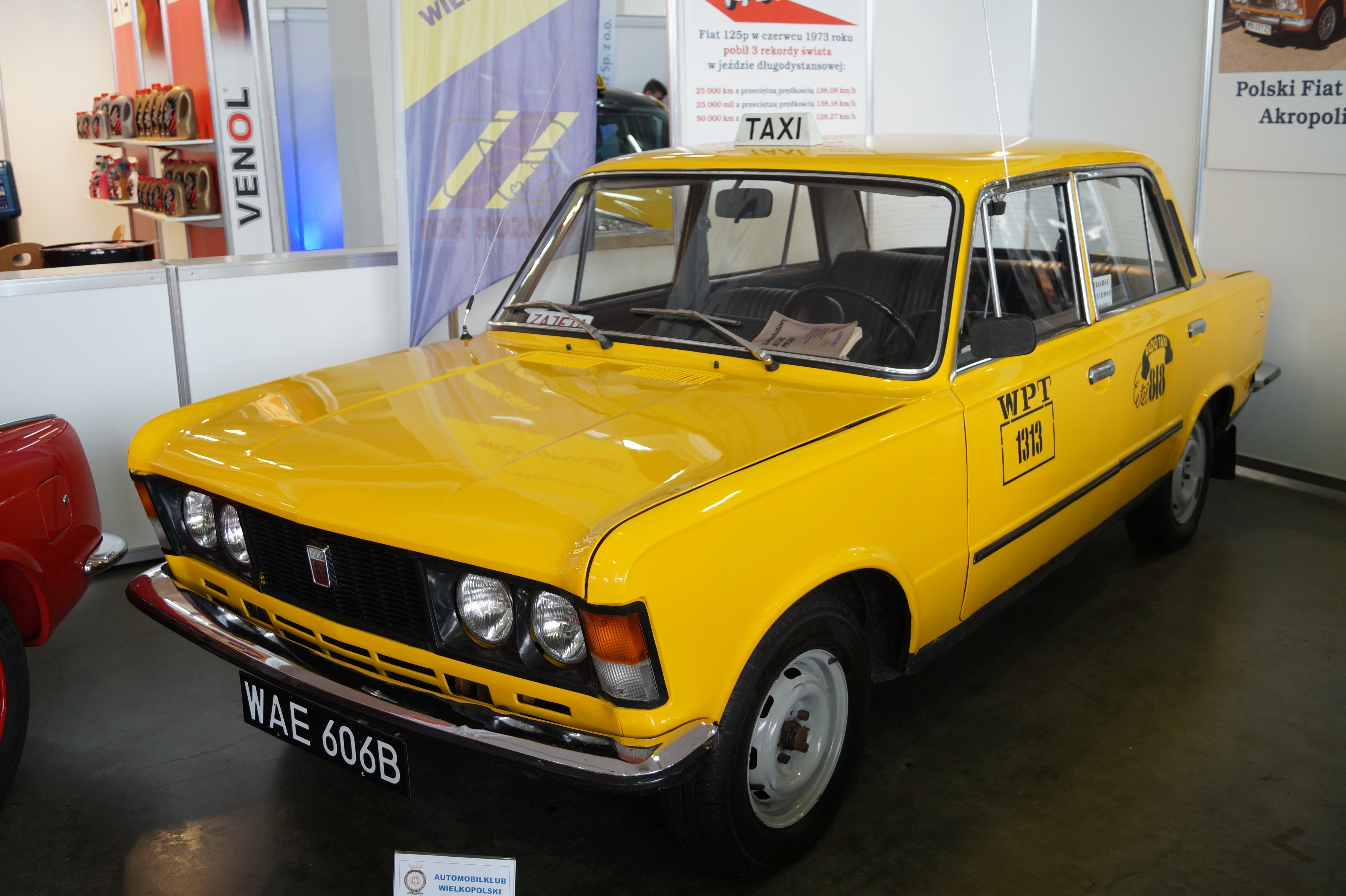 The making of this document was supported by Wikimedia Polska Association, within Wikigrant no. WG 2016-10. Polski Fiat 125p stylizowany na taksówkę z serialu Zmiennicy na Motor Show Poznań 2016